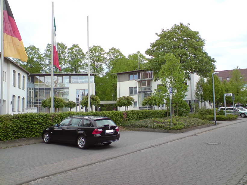 Bezirksvertretung Hiltrup (Bildmitte) in Münster (Westf). Links im Bild das alte Gebäude der Clemensschule, rechts die Polizweiwache Hiltrup.